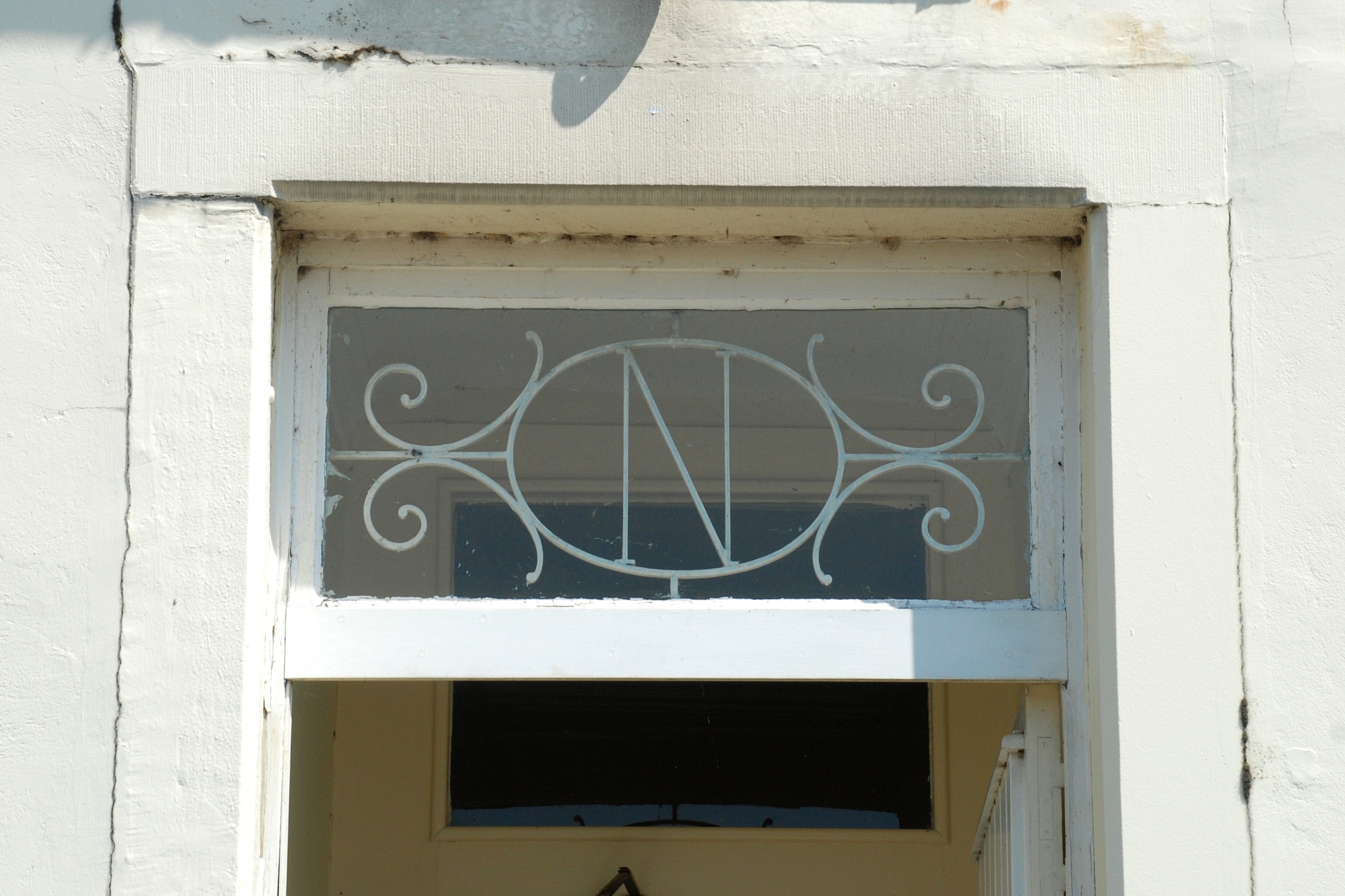 Belgique - Brabant wallon - Genappe - Ferme du Caillou